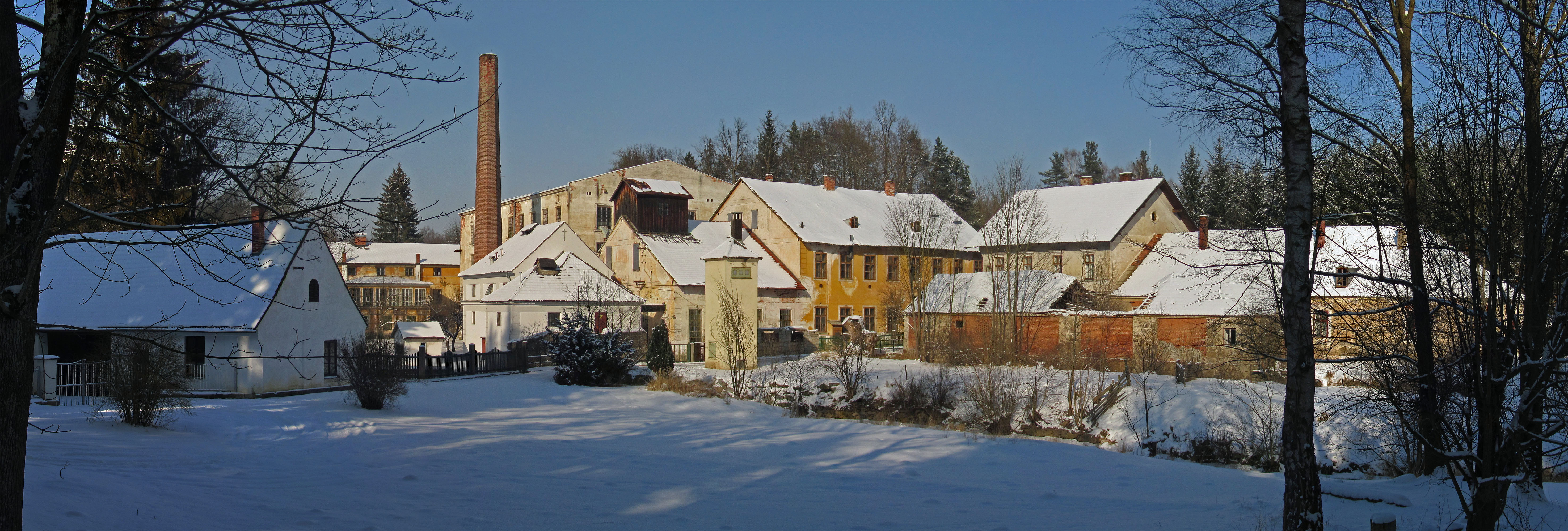 Anderlfabrik bei Kleedorf - winterliche Südansicht